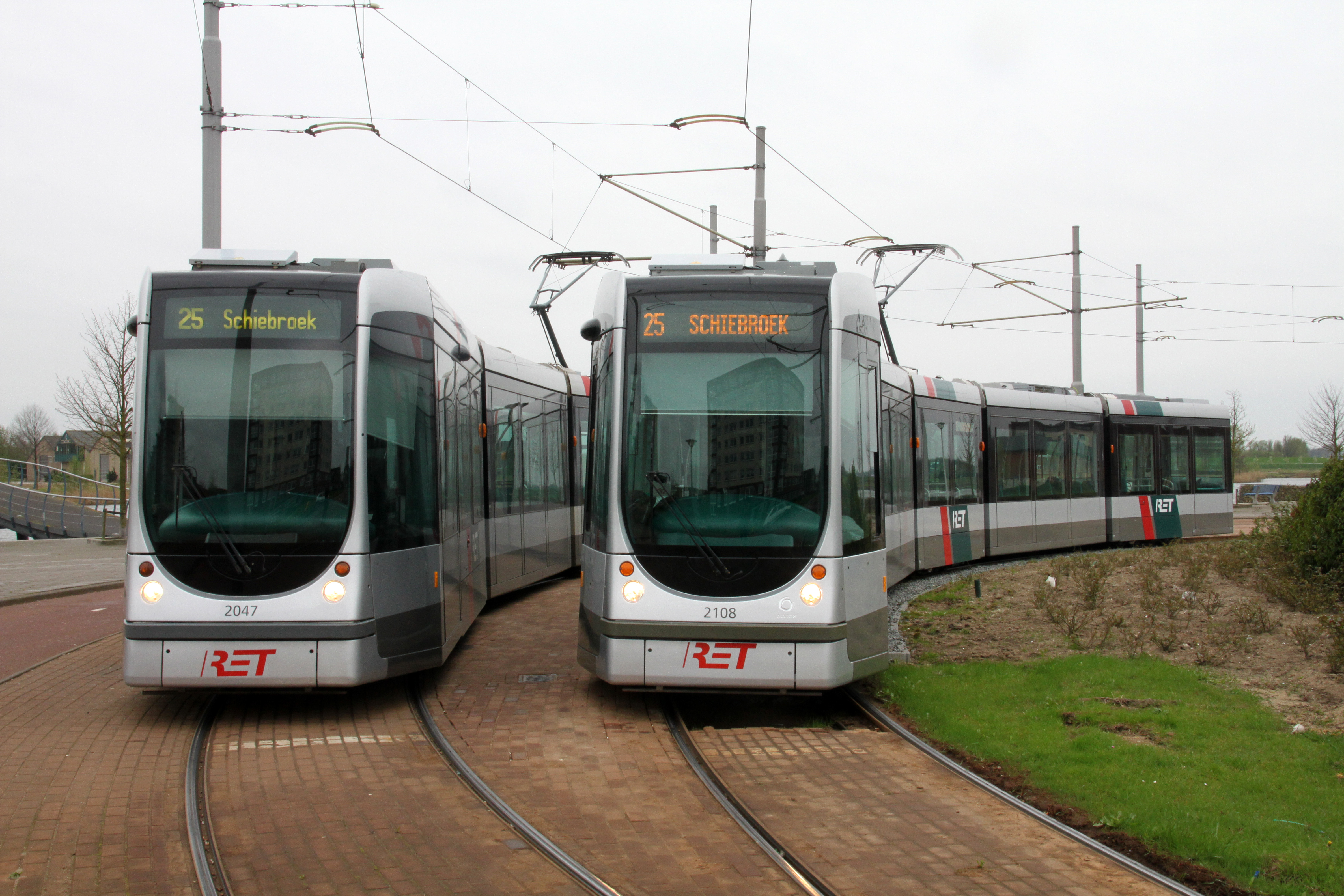 Foto van een Citadis in Rotterdam uit de 2100-serie.